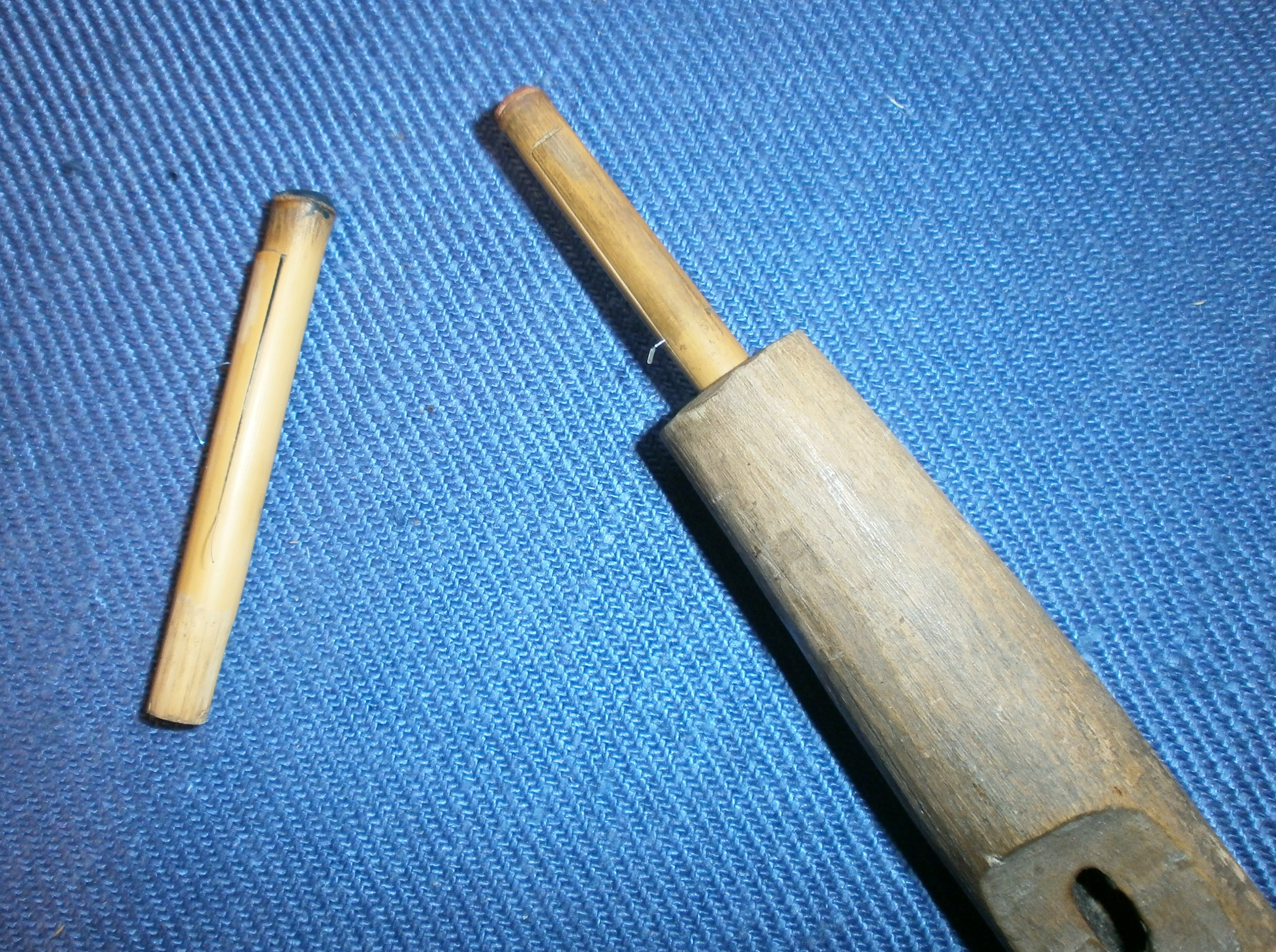 Enkla rörblad till svensk säckpipa, ett monterat och stämt med ett hårstrå.